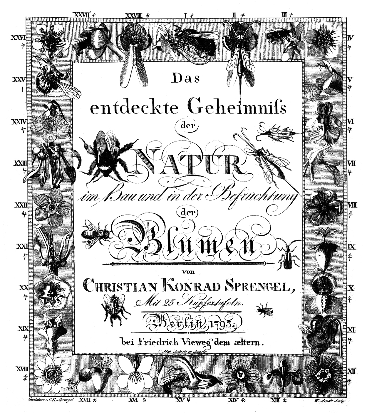 Cover of Das entdeckte Geheimniss der Natur im Bau und in der Befruchtung der Blumen by Christian Konrad Sprengel (1793)